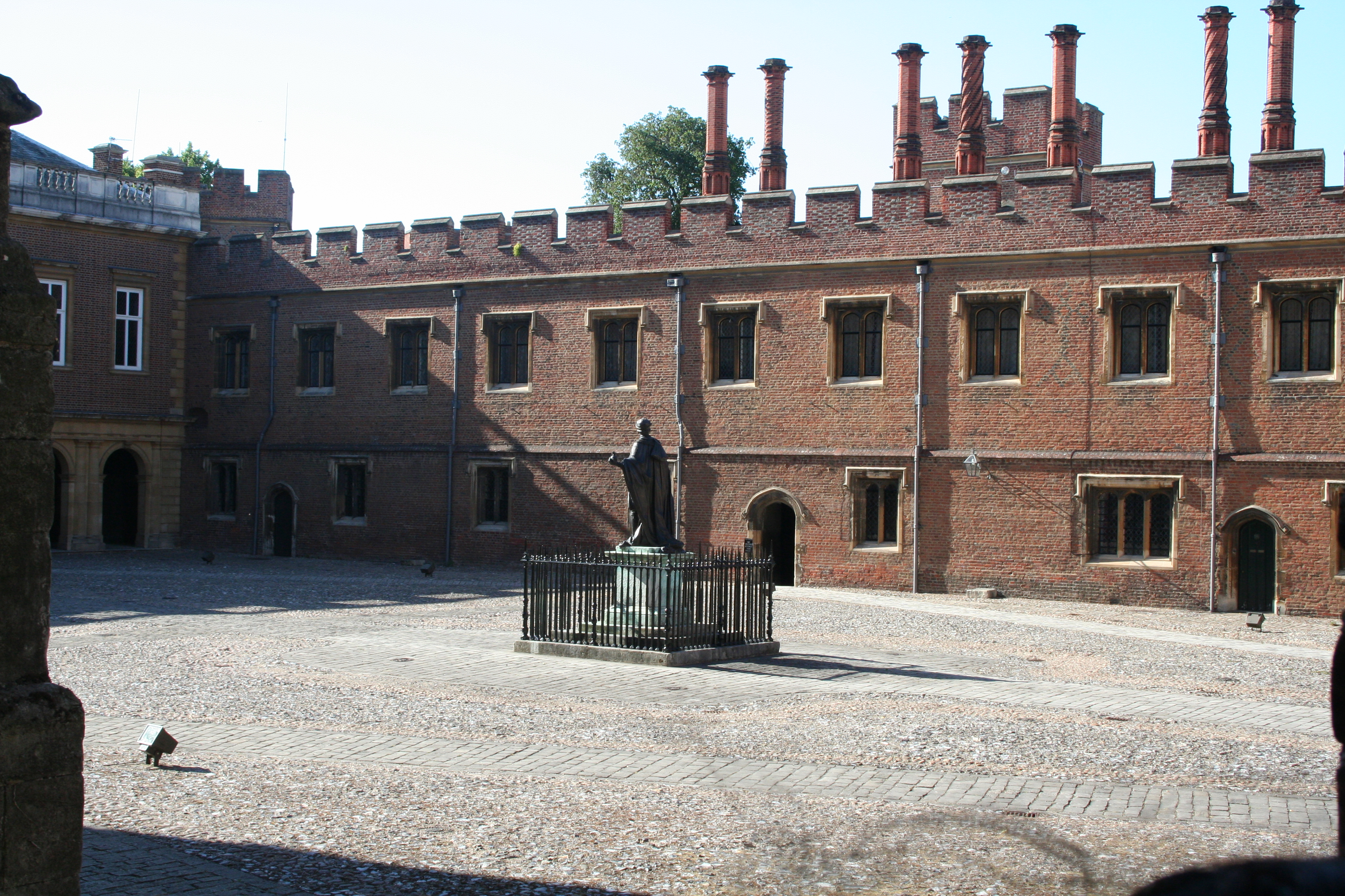 Eton quadrangle